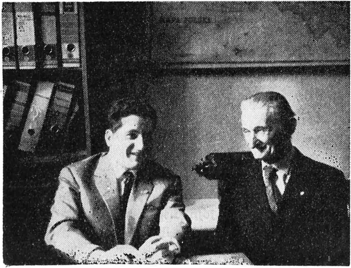 Pola veterano, eminenta aganto de nia movado, s-ano Stanislaw Rdnicki kaj nia gasto el Belguĵo, italo Gian Carlo Fighiera. Rememorante la imponan 44-an UK, okazintan ĝuste en Varsovio (1959), kiun i.a. ili preparadis, certe dum la nuna ren- kontiĝo ili daŭrigas amikan babiladon kaj ŝpinas estontajn planojn. Do, — por momento interrompan te vian babiladon — ,,Pola Esperantisto” deziras varme kaj kore al vi ambaŭ multaĵn, sukcesojn.